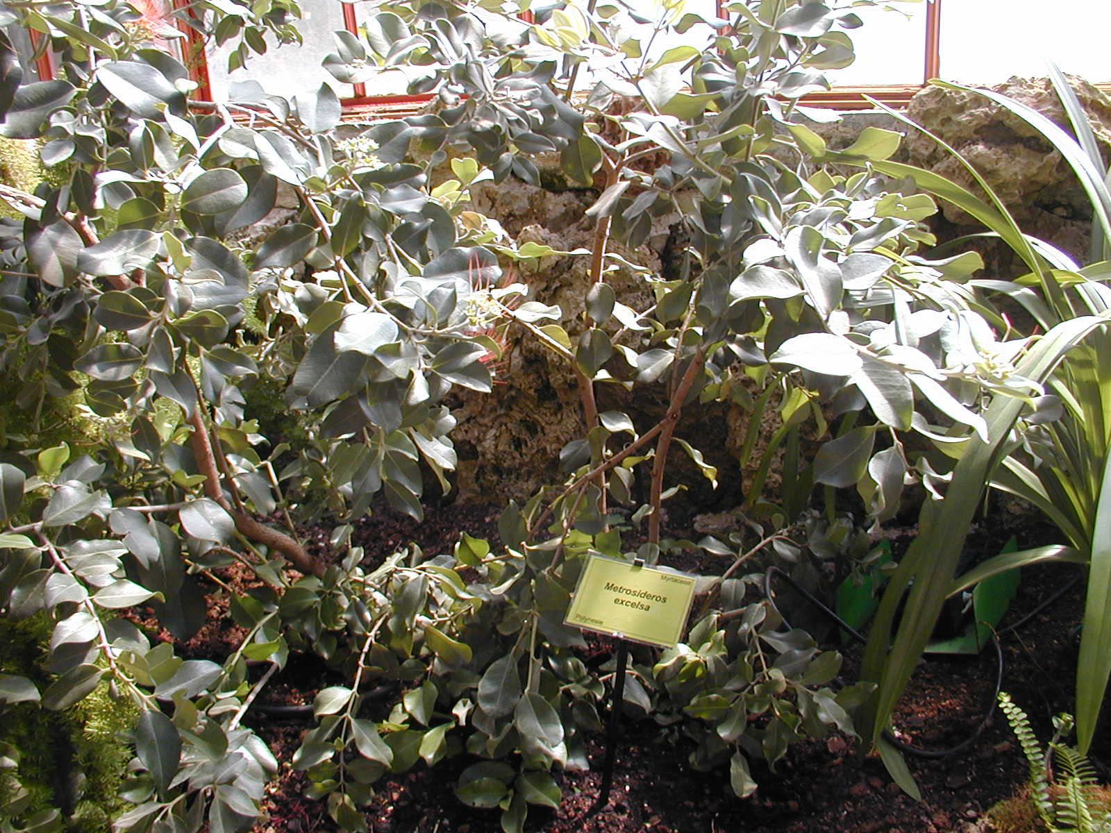 Metrosideros excelsa, à la Bambouseraie de Prafrance à Anduze (France).